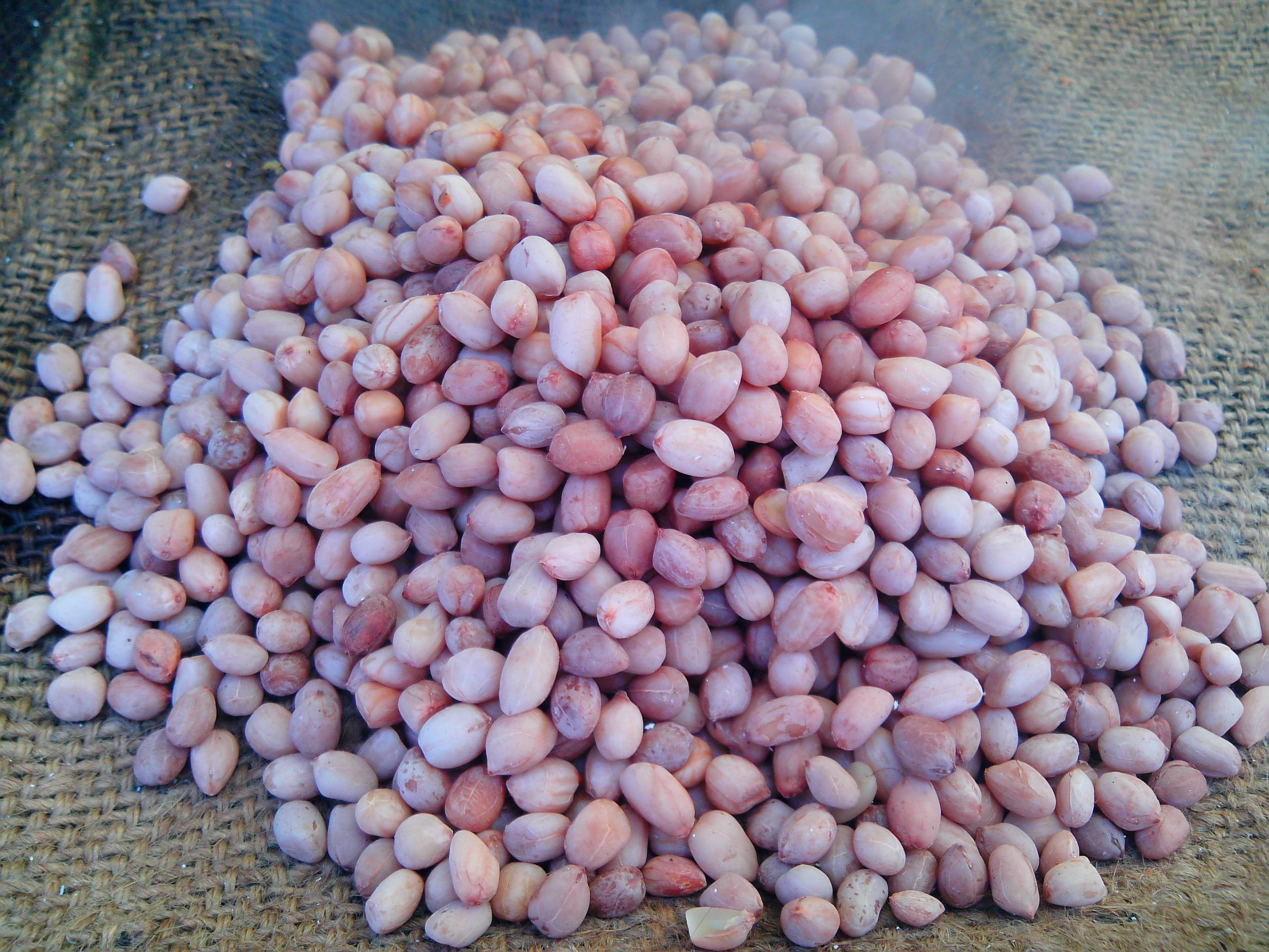 அவித்த வேர்க்கடலை